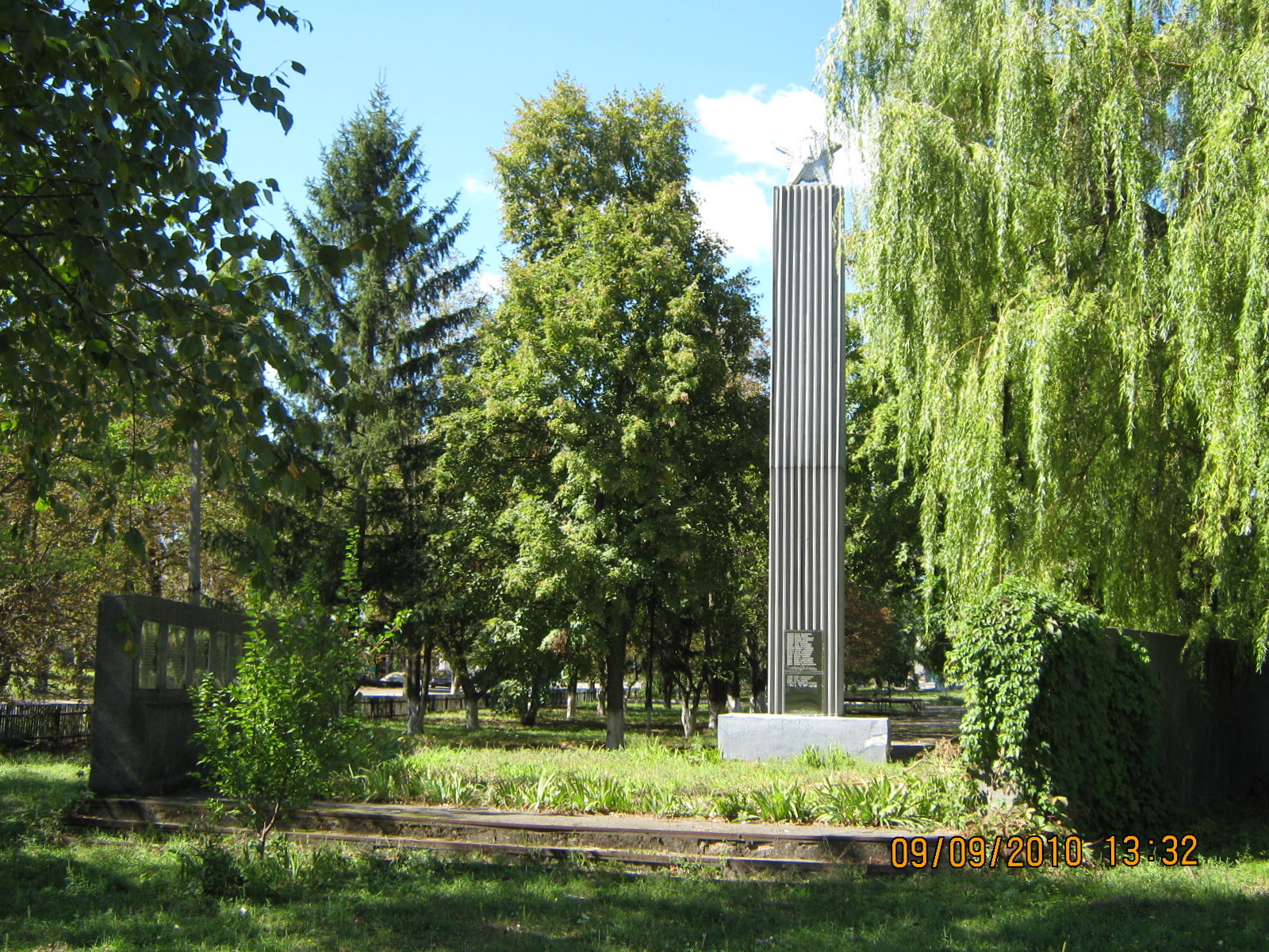 Пам'ятник полеглим землякам селі Куцеволівка